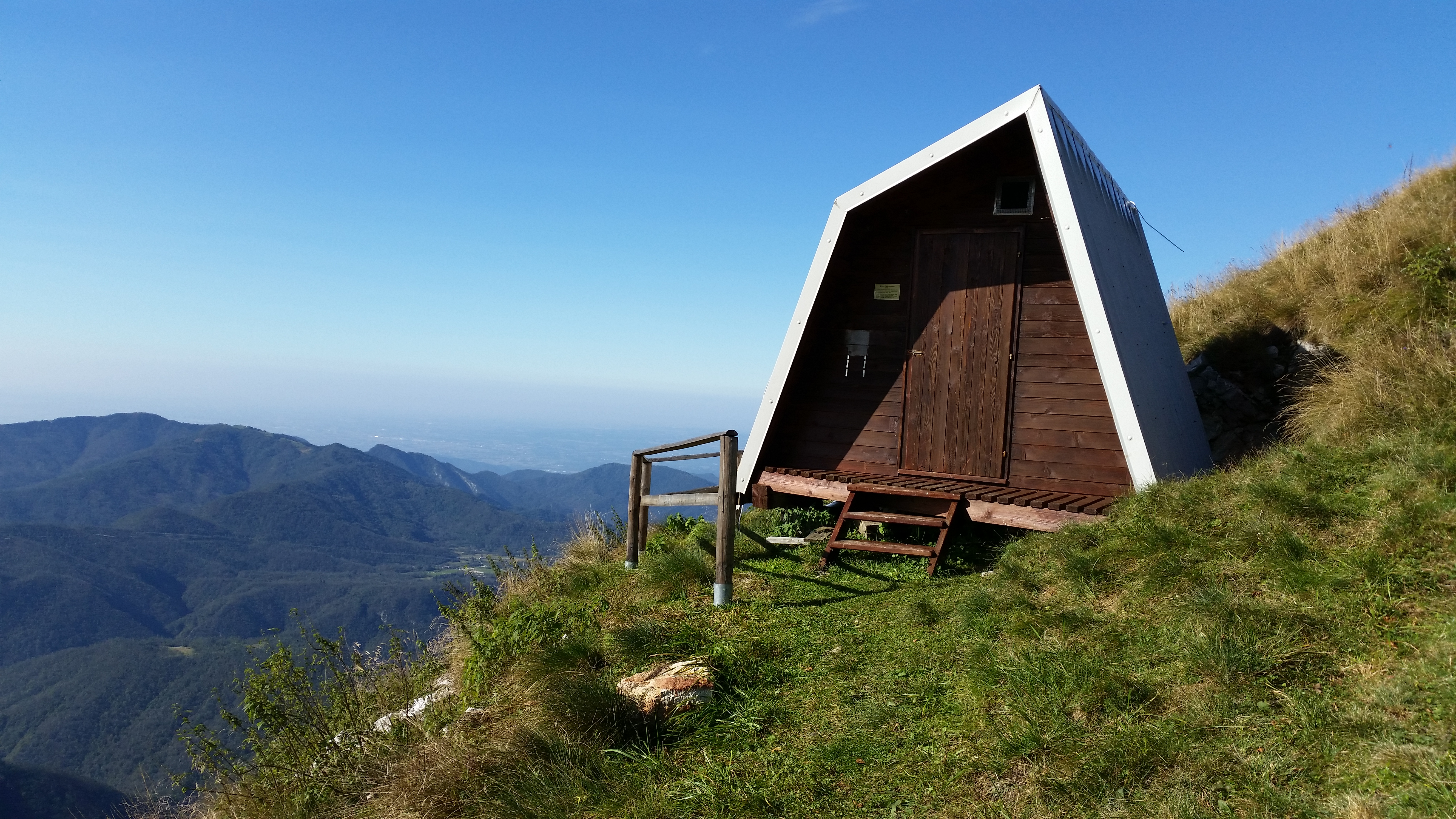 Bivak pod Muzcem (1550 m) Planinci odseka Breginj, so skupaj z Razvojnim društvom Breginjski kot leta 2002 zgradili lep bivak med Gabrovcem(Gabrucem) (1630 m) in Muzcem(Muscem) (1612 m) v Stolovem pogorju.